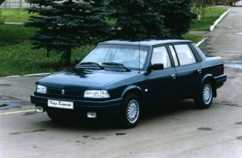 AZLK-2142 aka Moskvitch Duke Vladimir